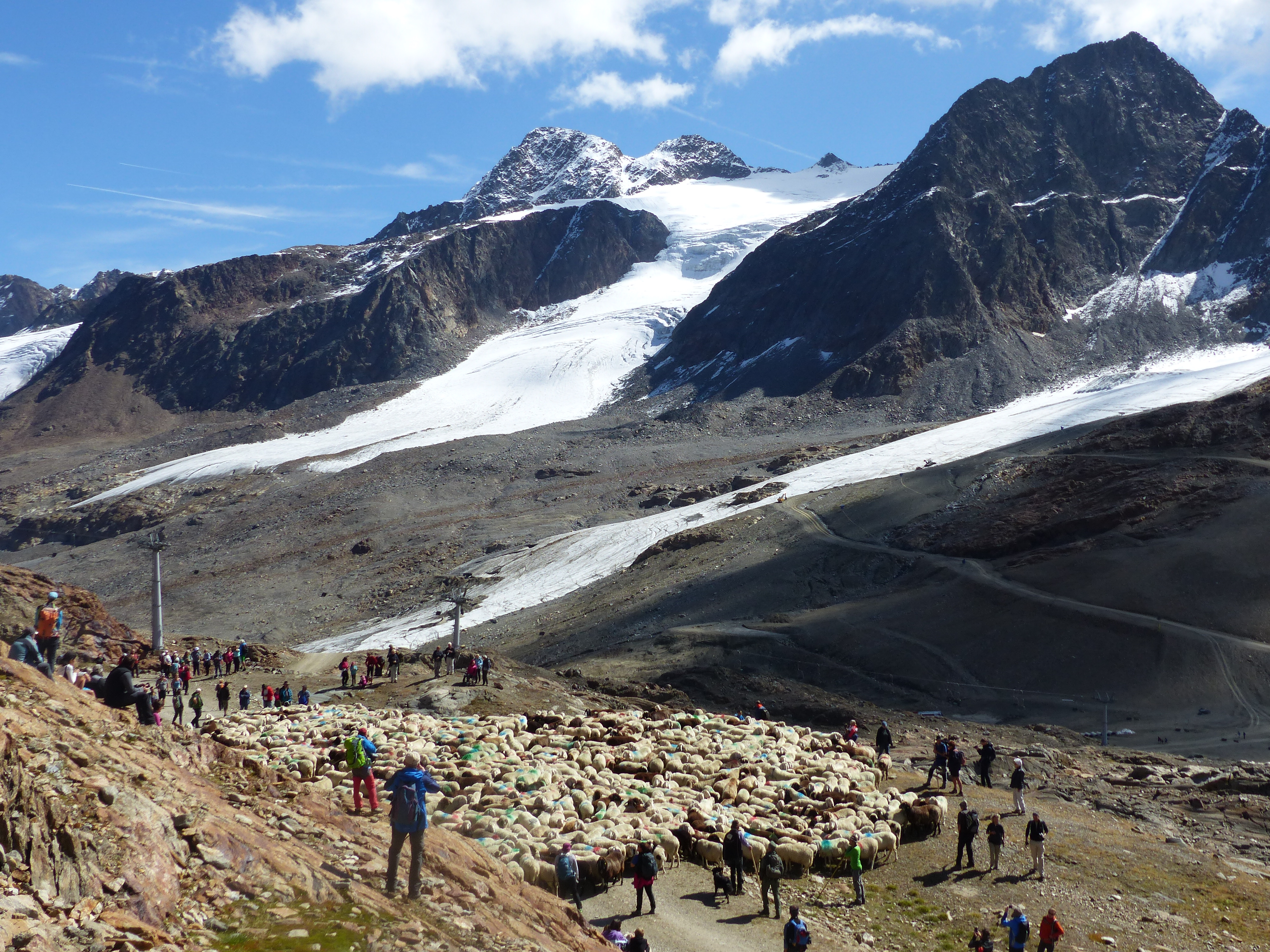 Schafe auf dem Hochjoch an der Schönen-Aussicht-Hütte: Hochjochferner